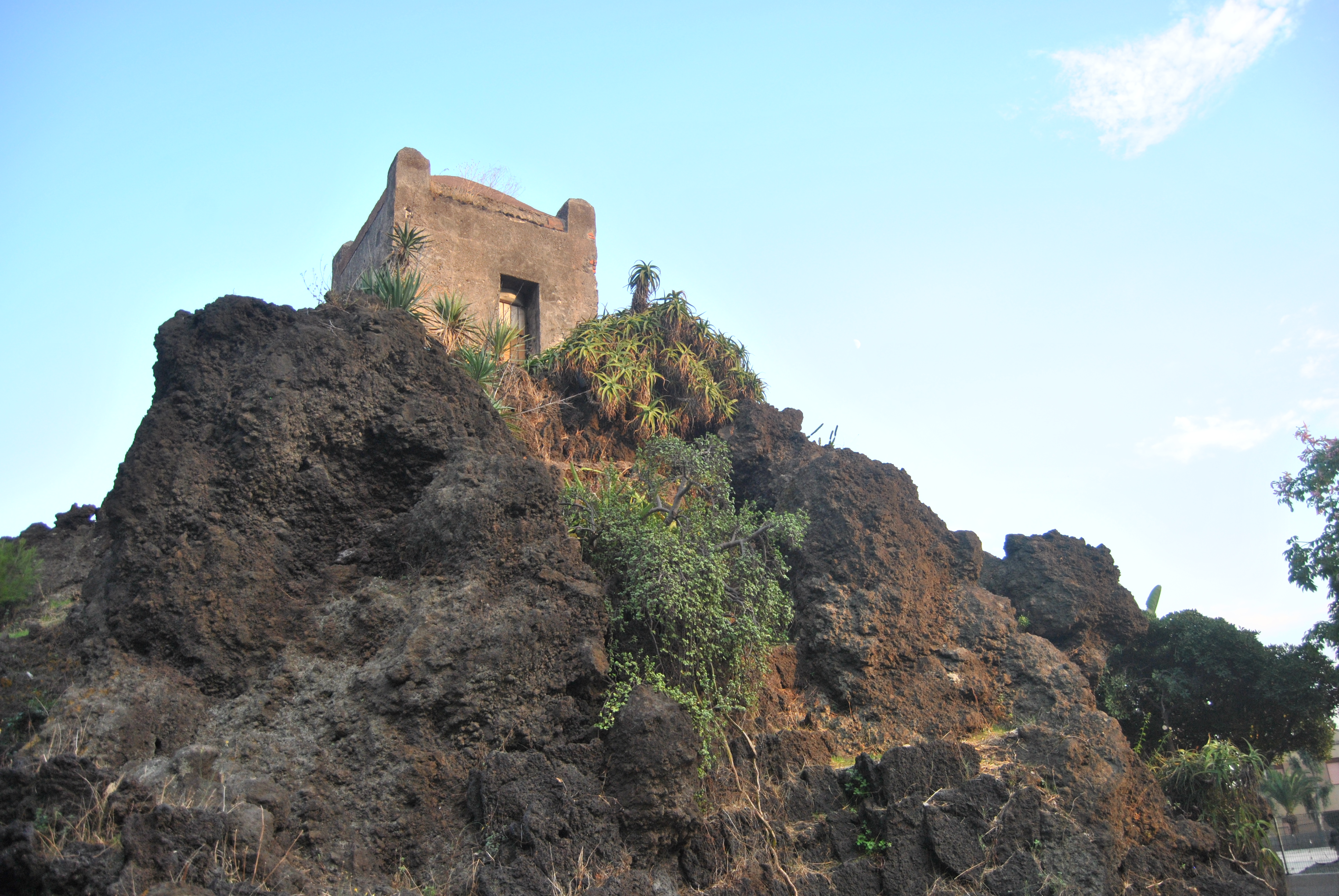 Garitta d'avvistamento di XVI secolo, detta "Torre Saracena" rimasta un tempo a decoro della perduta piazza Europa e dalla giunta Scapagnini in poi (2001) ridotto in ricovero e deposito per clocharde e clandestini.